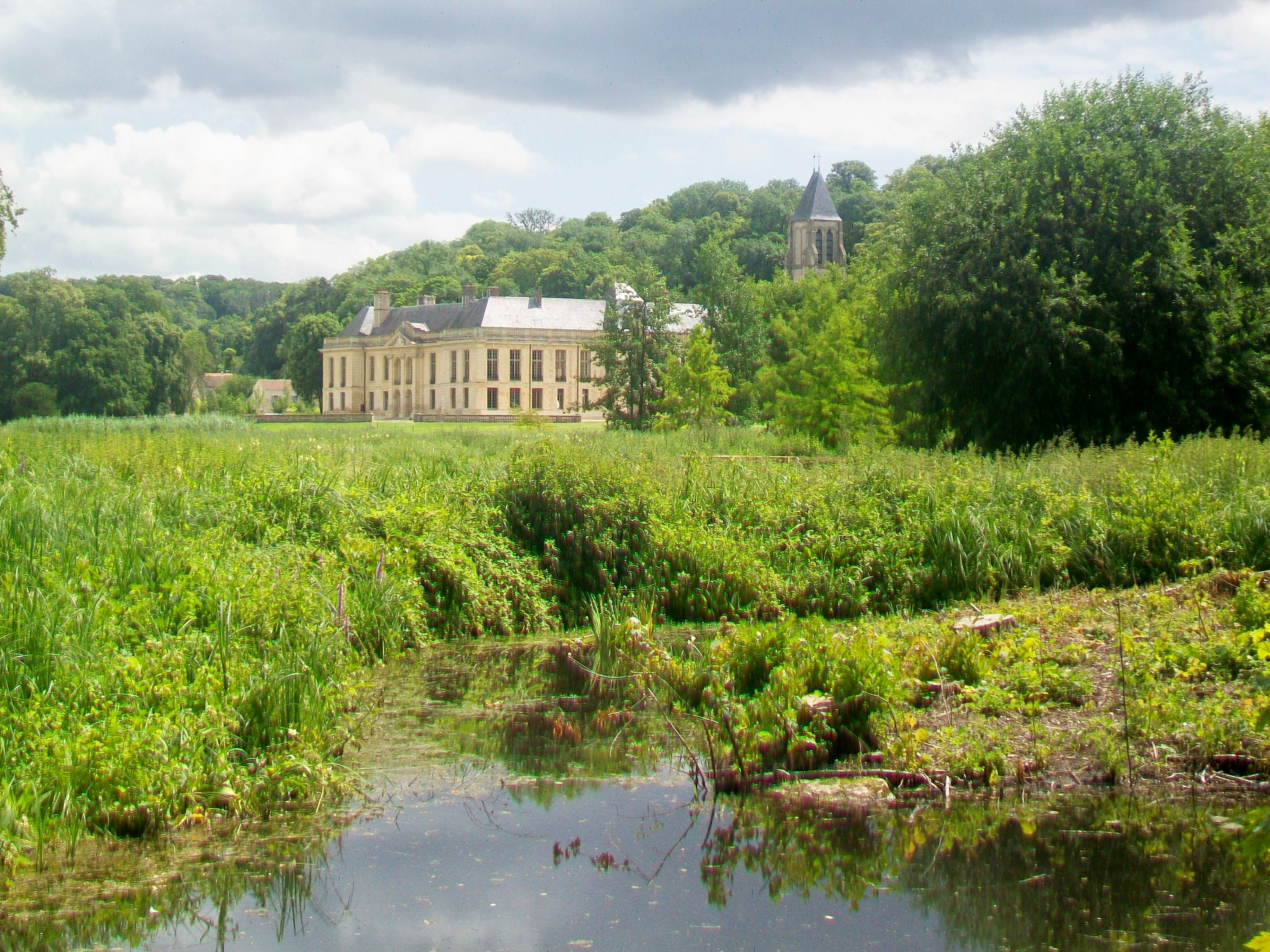 Vue sur le château depuis l'ouest (chemin de promenade extérieur).